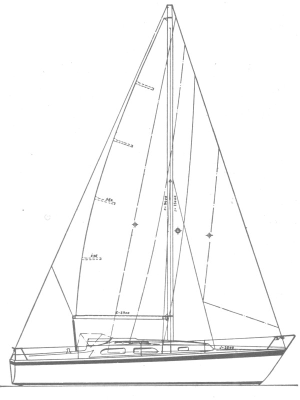 Segelplan Ohlson 8:8, Konstrukteur: Einar Ohlson